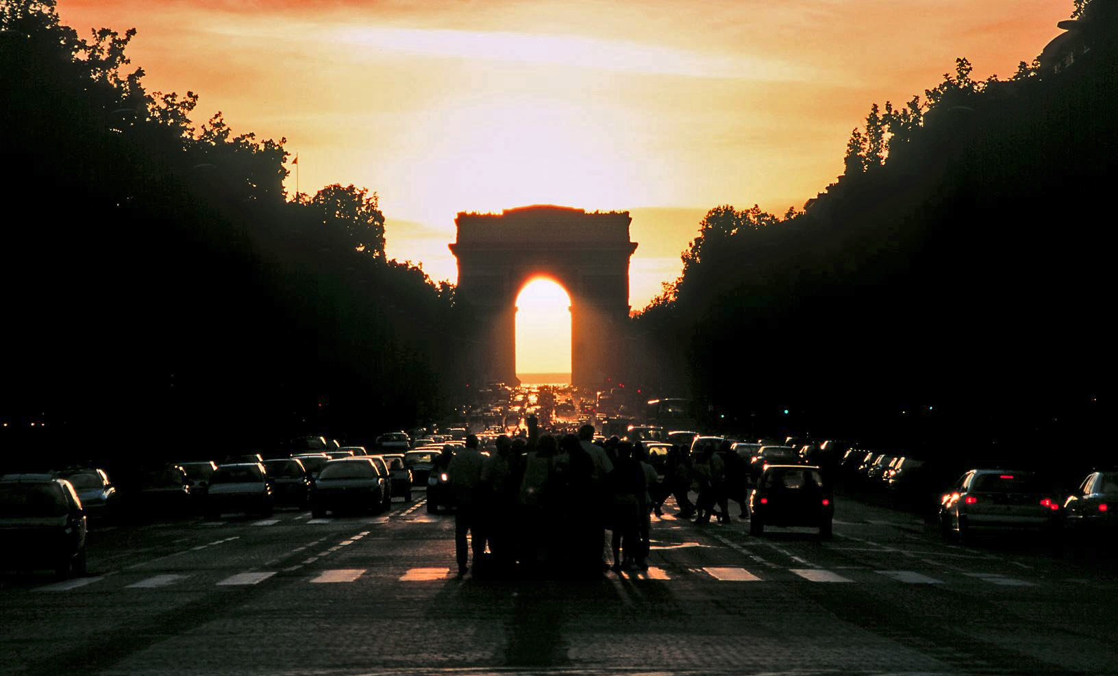 Paris, Champs-Élysées, Août 1997 : le soleil se couche à travers l'arche de l'Arc de Triomphe. Au premier plan, observant le spectacle, des badauds, dont de nombreux photographes. On remarquera que leur file s'étend, jusqu'en haut des Champs-Élysées.